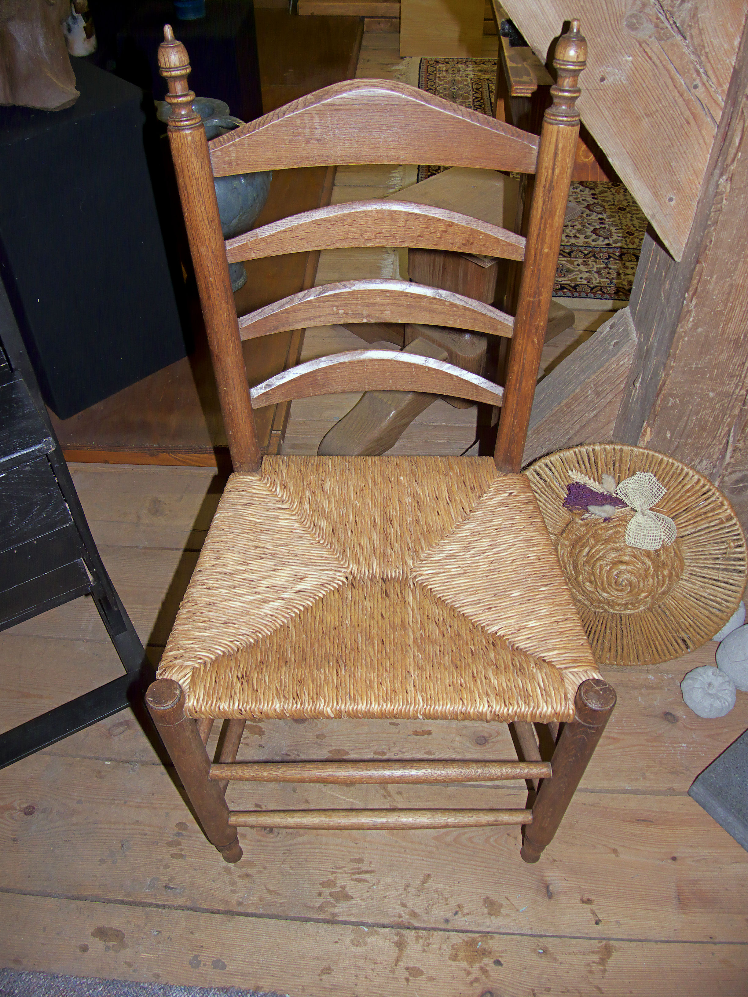 stoel met biezenmattenzitting